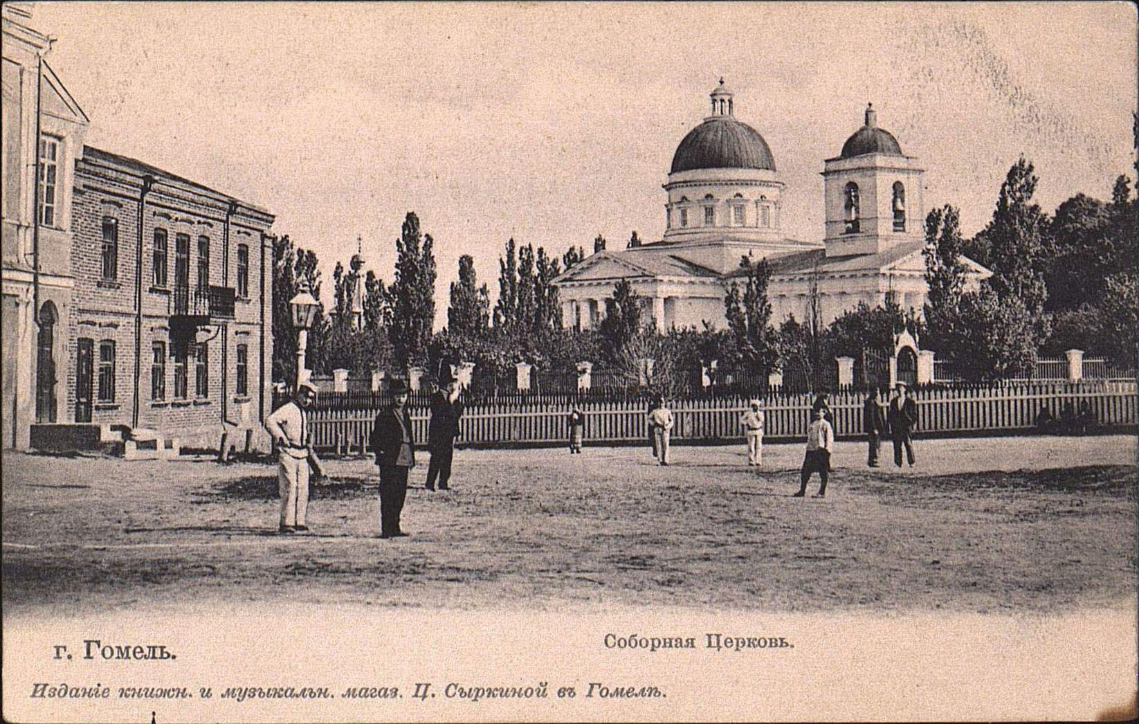 Беларуская (тарашкевіца): Гомель (Homiel), пляц Рынак (plac Rynak) або Саборны (plac Saborny). Саборная царква Сьвятых Апосталаў Пятра і Паўла